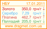 Інформер вартості золота та інших банківських металів відповідно до курсу встановленому НБУ